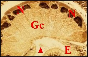 Coussinet à cellules géantes de la glande botrioïde de Kaira